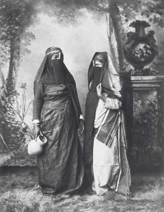 Studioportret van twee gesluierde Egyptische vrouwen. De achtergrondschildering op deze foto werd door fotograaf Hippolyte Arnoux voor diverse studioportretten gebruikt (Wieczorek & Sui, p. 111).